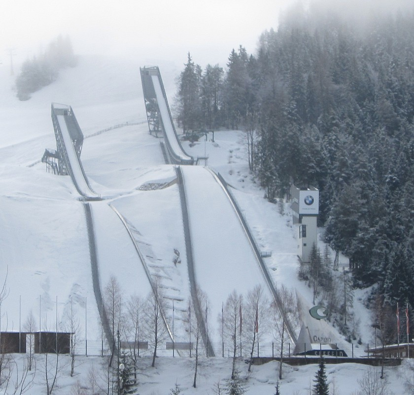 Toni-Seelos-Olympiaschanzen in Seefeld in Tirol